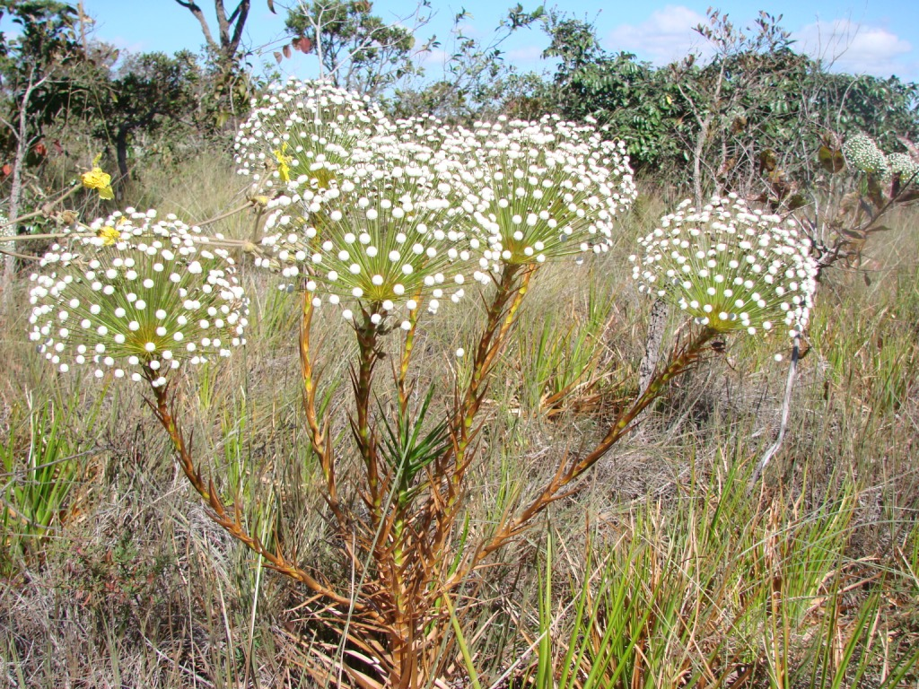 Actinocephalus bongardii, Eriocaulaceae - Brasilien/Brasil: Distrito Federal, Jardim Botanico de Brasília